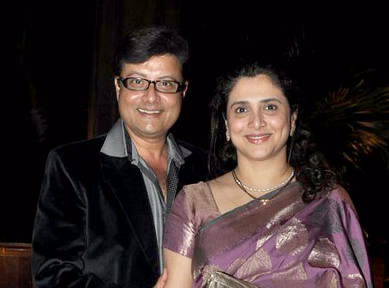 Sachin Pilagaonkar and Supriya Pilgaonkar at Abhinav & Ashima Shukla's wedding reception